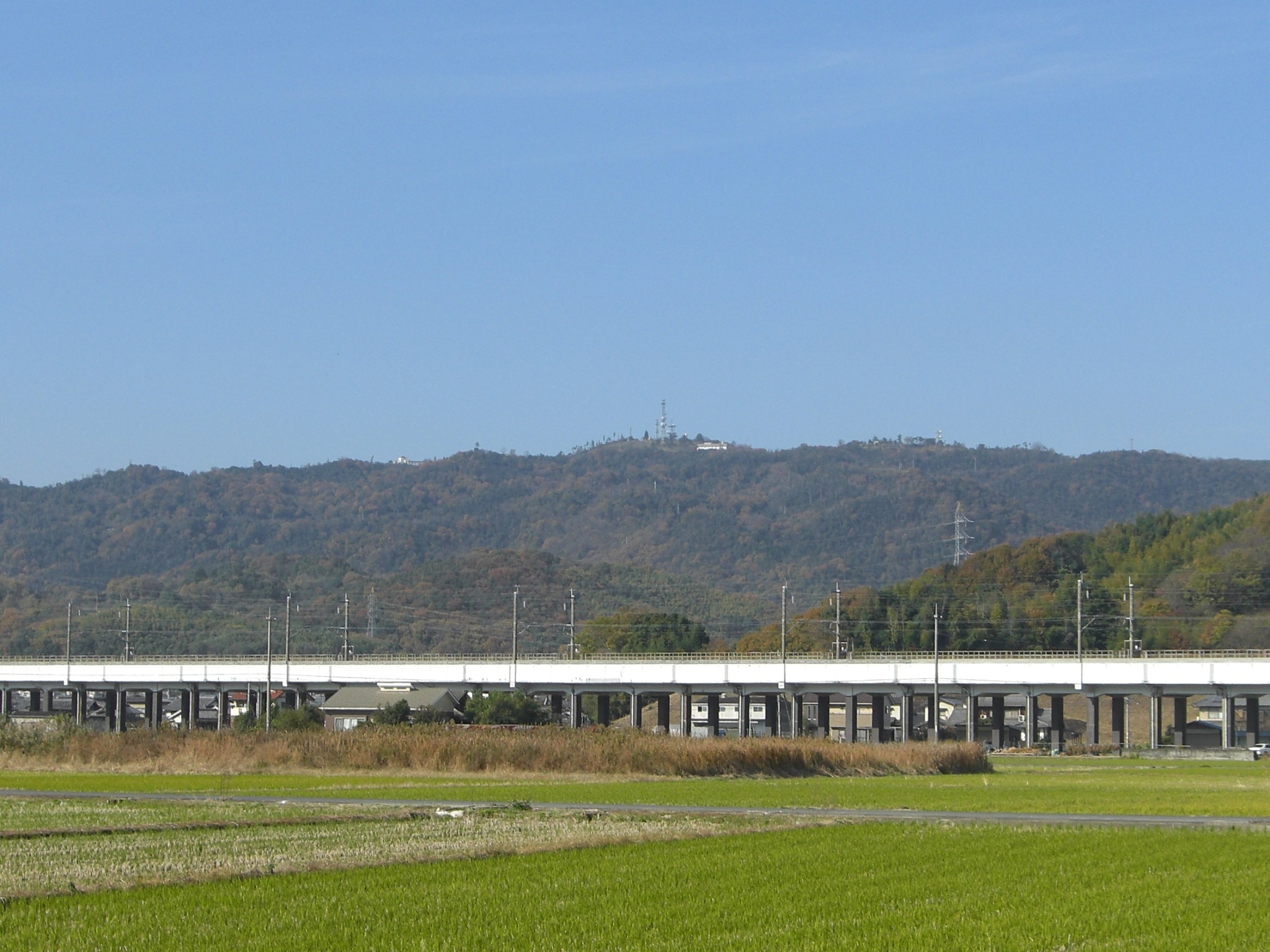 遙照山（岡山県浅口市）を撮影しました。 写真は一部トリミングしています。